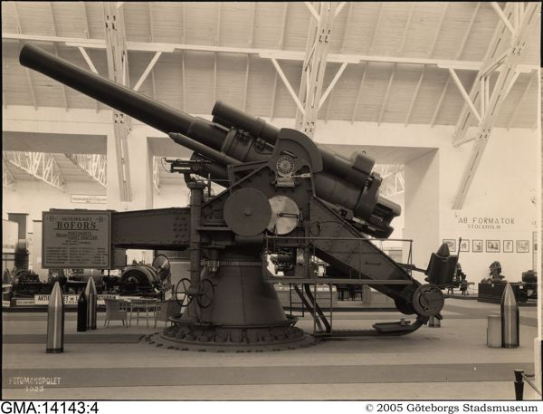 Aktiebolaget Bofors 30,5 cm Kusthaubits (Coast howitzer, Model of 1916) Total vikt (Total weight) 135.000 Kg. Projektilens vikt (Weight of projectile) 385,6 Kg. Laddningens vikt (Weight of charge) 60,0 Kg. Utgångshastighet (Muzzle velocity) 610 m/sek Största skottvidd (Max. range) 20.000 m. Största skjuthöjd (Max. firing height) 11.100 m. Mynningsenergi (Muzzle energy) 7.570.000 kgm. [text på skylten t.v.]